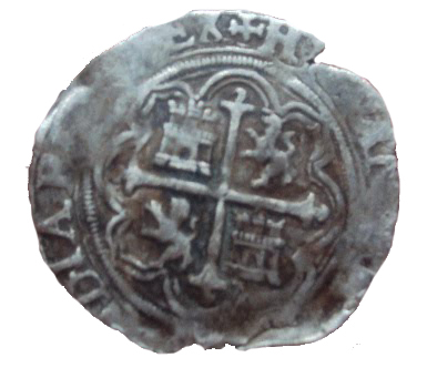 moneda usada durante la colonia el salvador